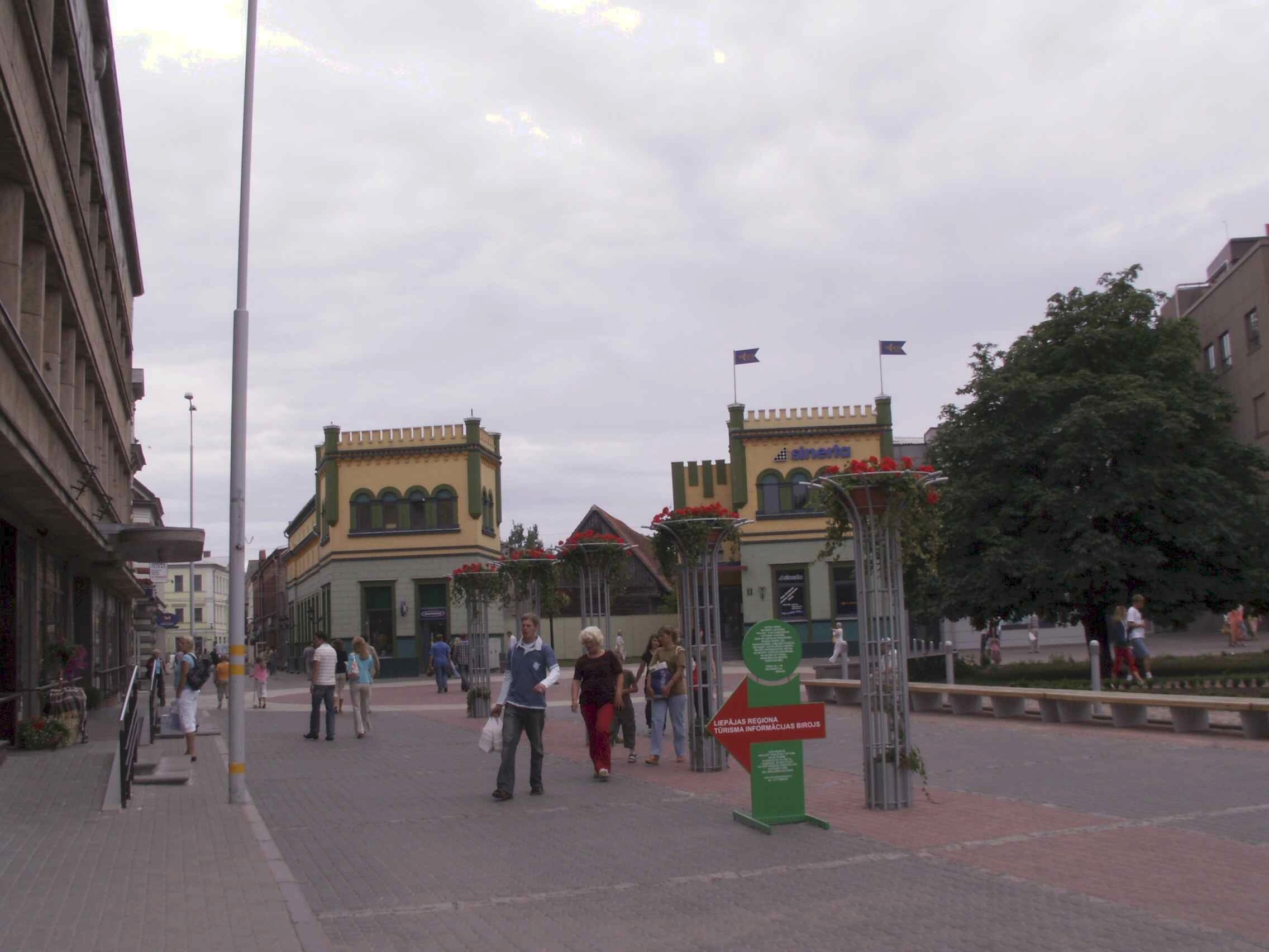 Liepoja